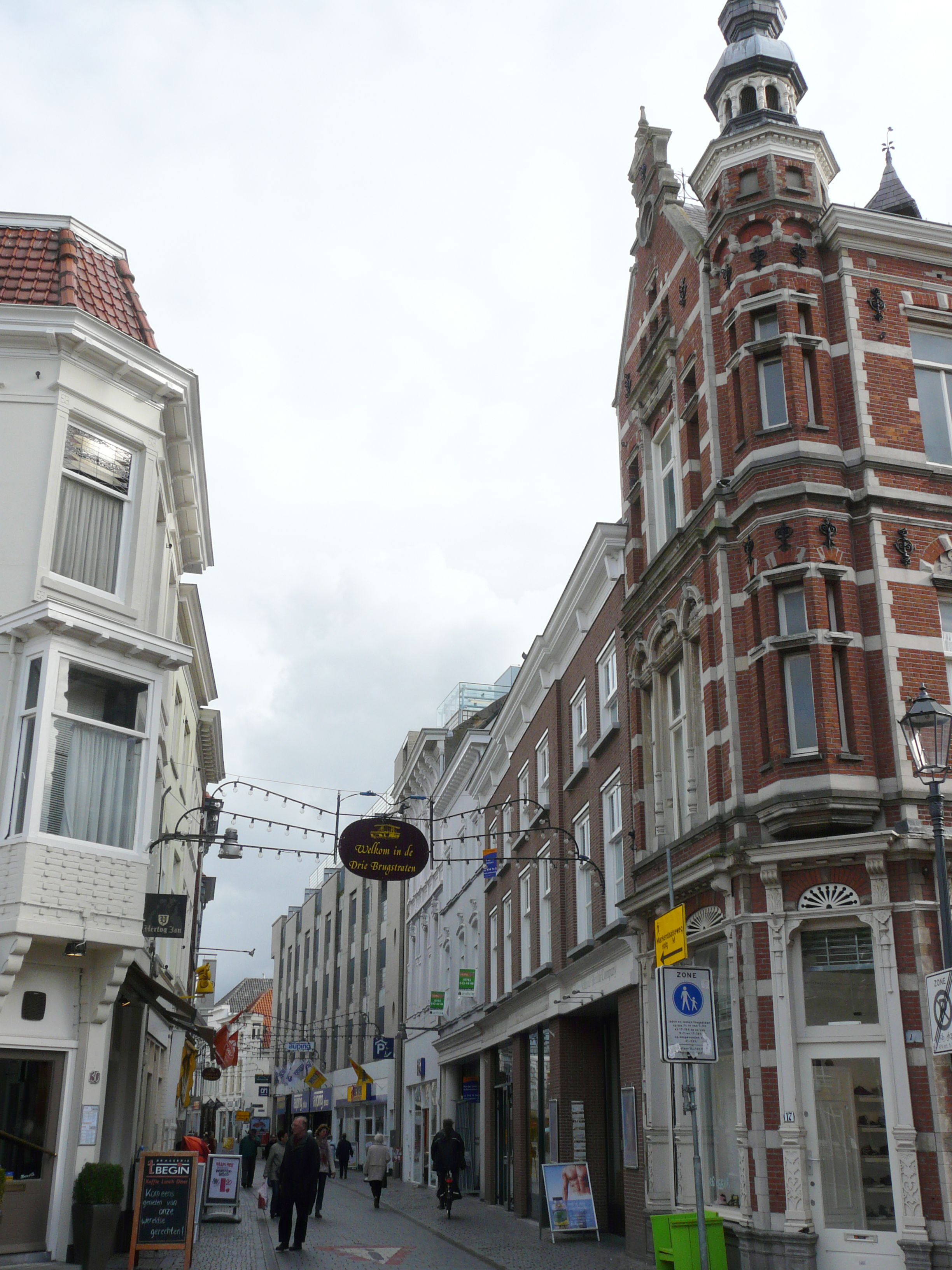 Lange Brugstraat in Breda Centrum in Breda